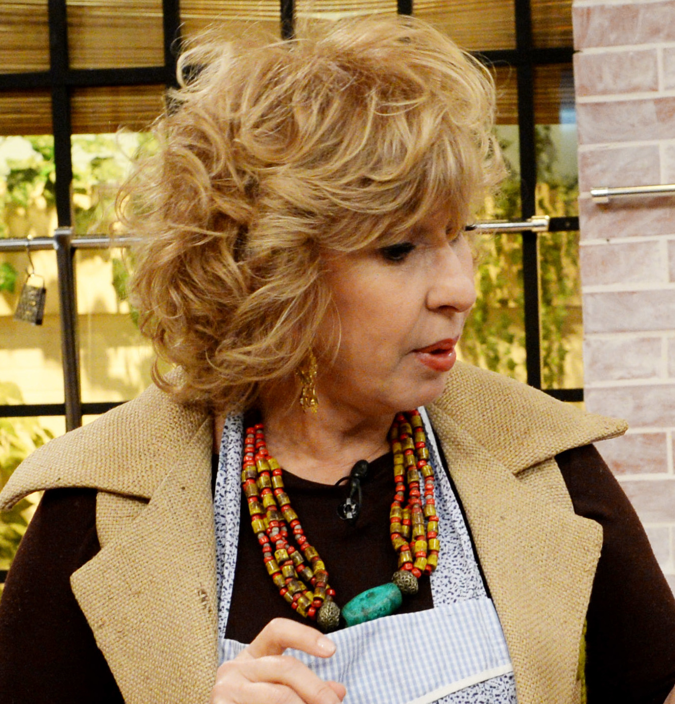 Georgina Barbarossa visitando el programa Cocineros argenitnos en 2015